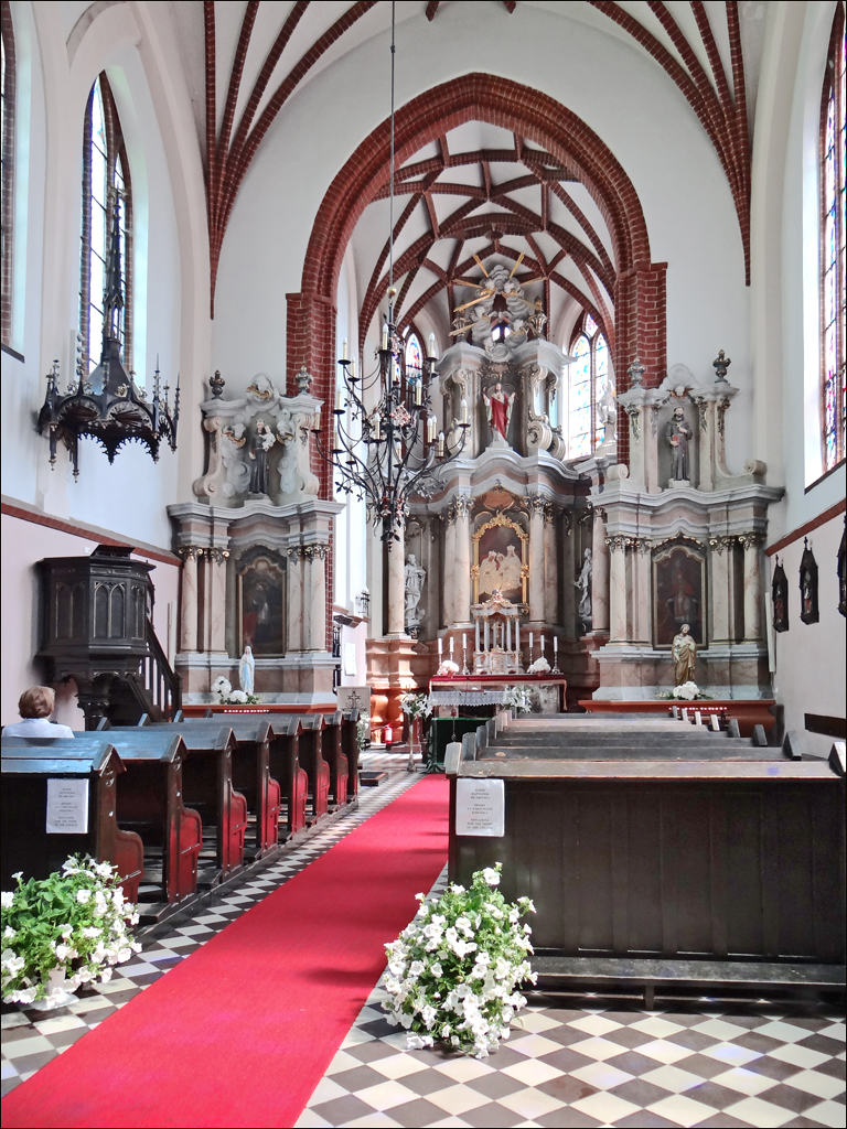 L’Église Sainte Anne est un chef-d’œuvre du gothique tardif. L’architecte de l’église ainsi que l’époque de sa construction sont sujets à débats. Extrait du site sur Vilnius